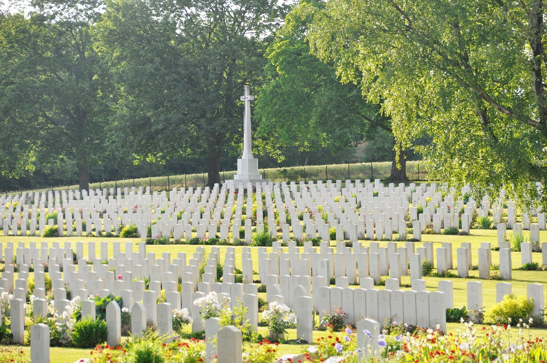 Hannover -Englischer Friedhof bzw War Cemetery